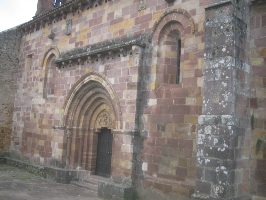 Iglesia de Santa María, en Yermo, Cantabria, España